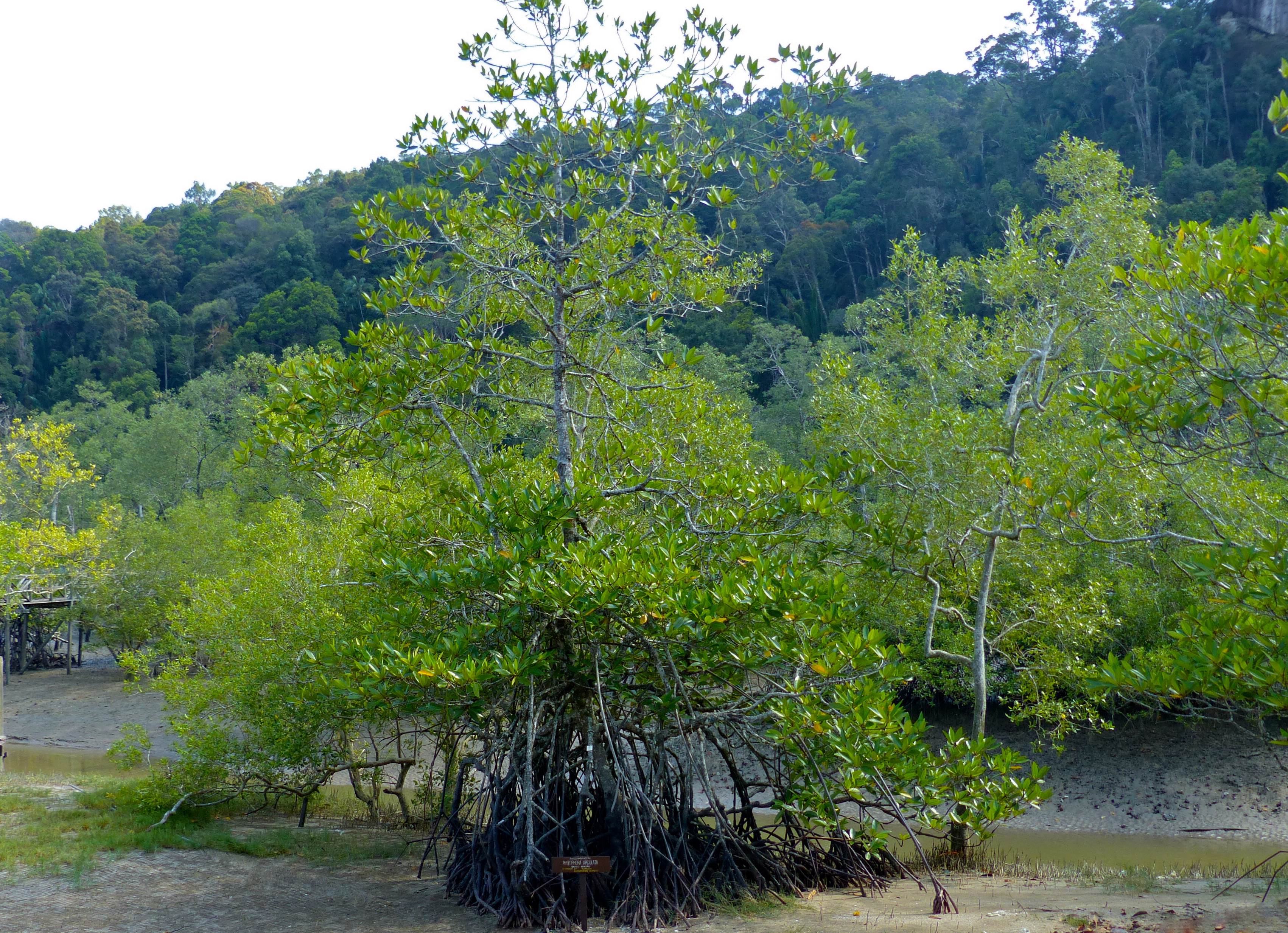 Bako NP, Sarawak, MALAYSIA